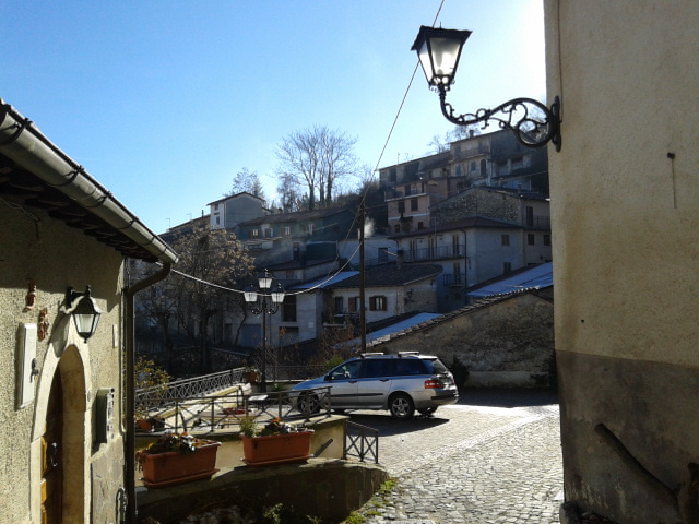 Scorcio fotografico del borgo antico